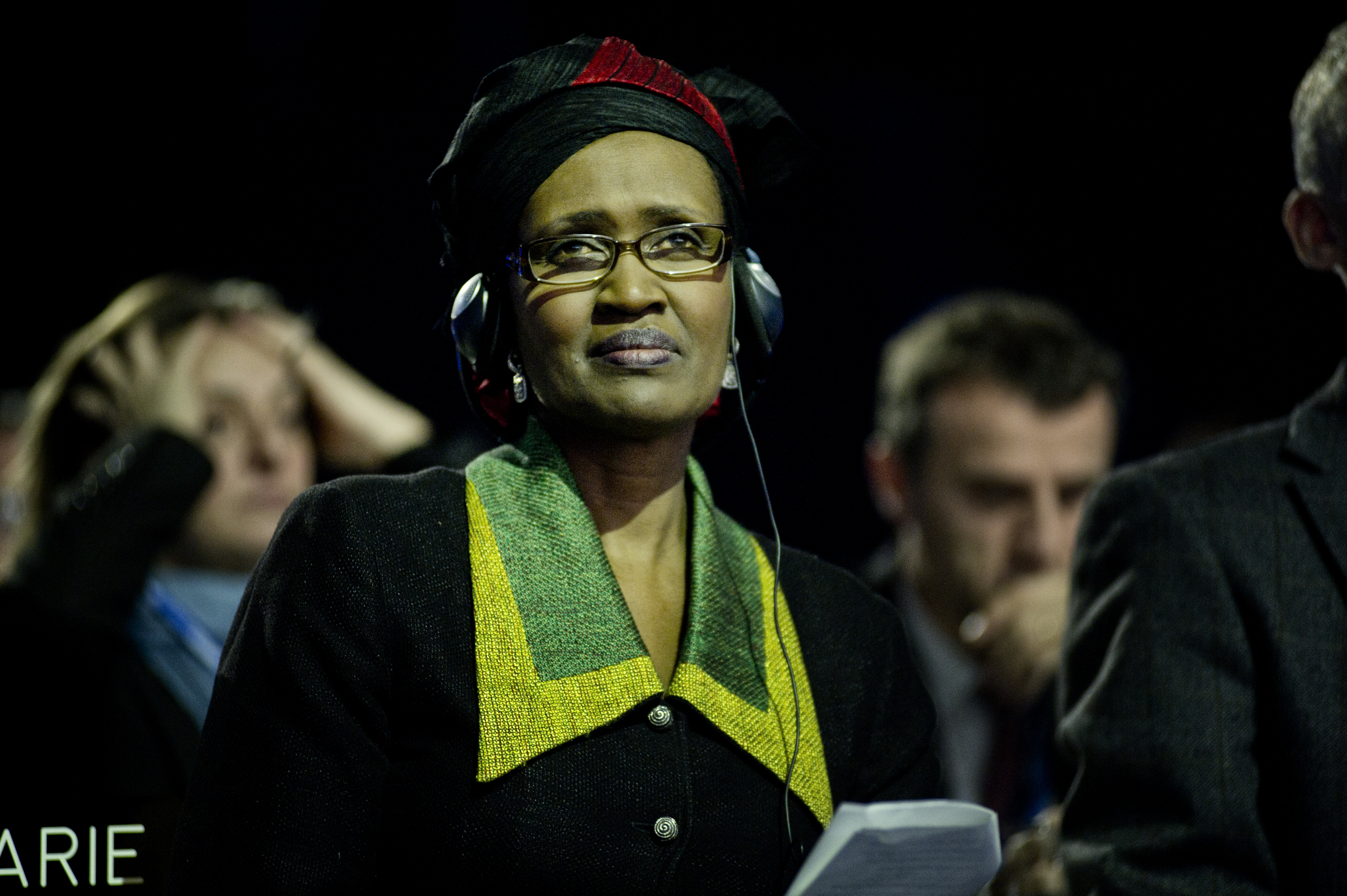 Winnie Byanyima, directrice exécutive d'Oxfam international